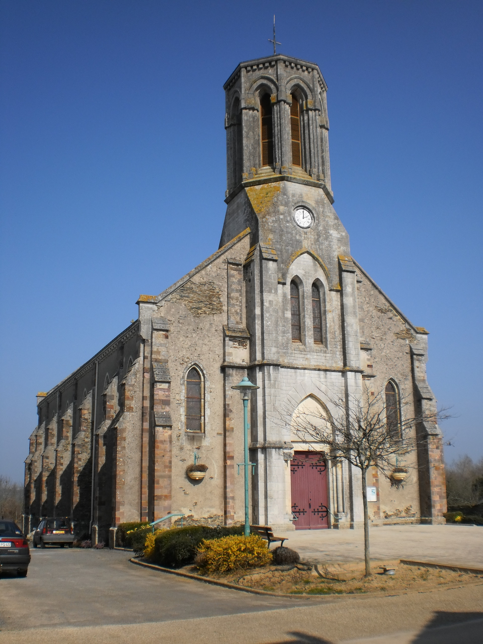 Massérac (Loire-Atlantique, France) - église